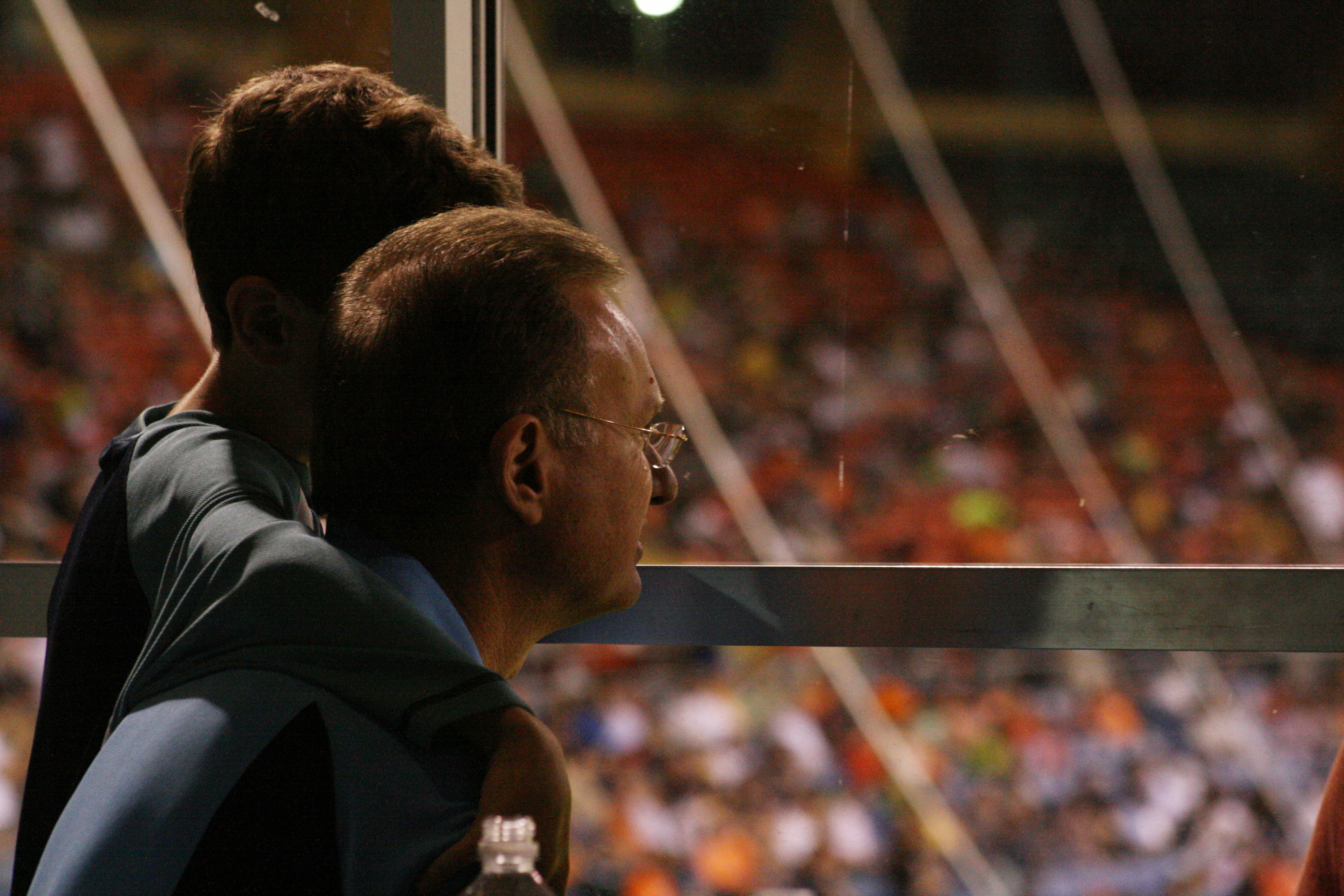 el alcalde de Bayamón, Ramon Luis Rivera hijo presenciando un juego de los Puerto Rico Islanders